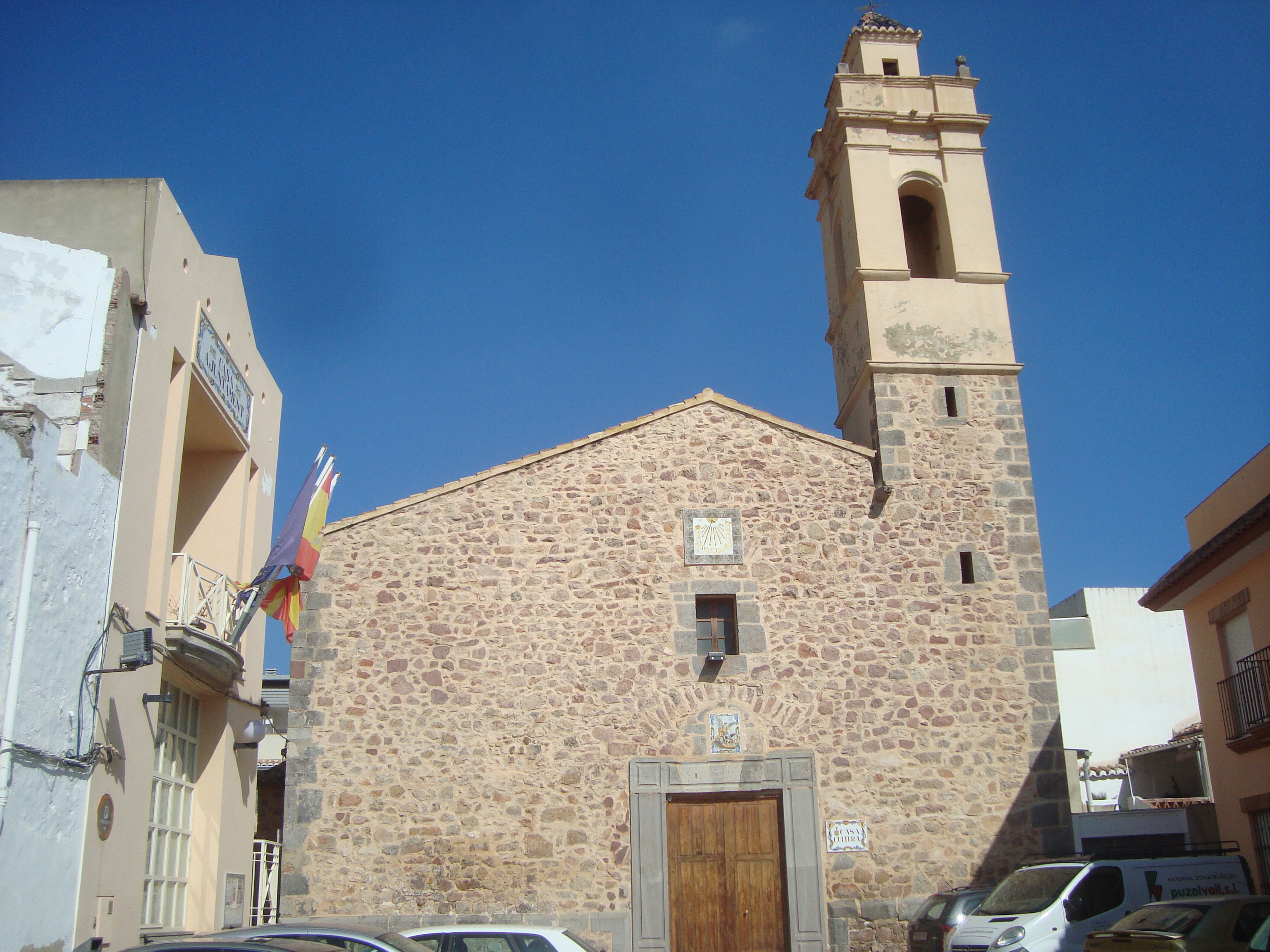 Antiga Església parroquial de Sant Miquel Arcàngel (Quart de les Valls)